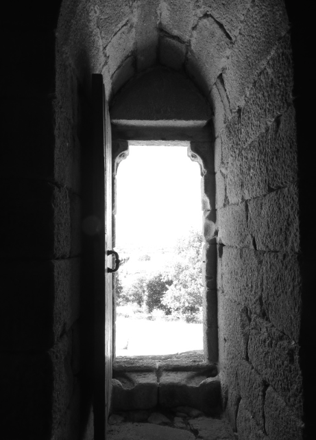 vista de la puerta desde el interior